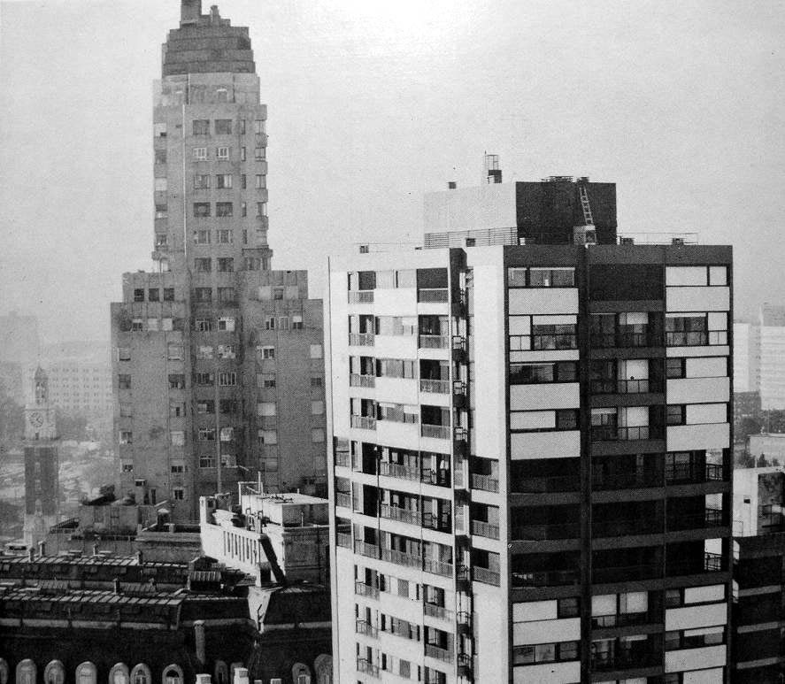 Vista del remate de la Torre Plaza (calle Marcelo T. de Alvear nº 534). Ciudad de Buenos Aires, Argentina. Detrás asoma el Edificio Kavanagh.